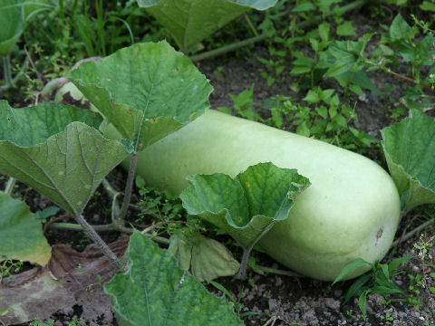 Lagenaria siceraria Clavata Group